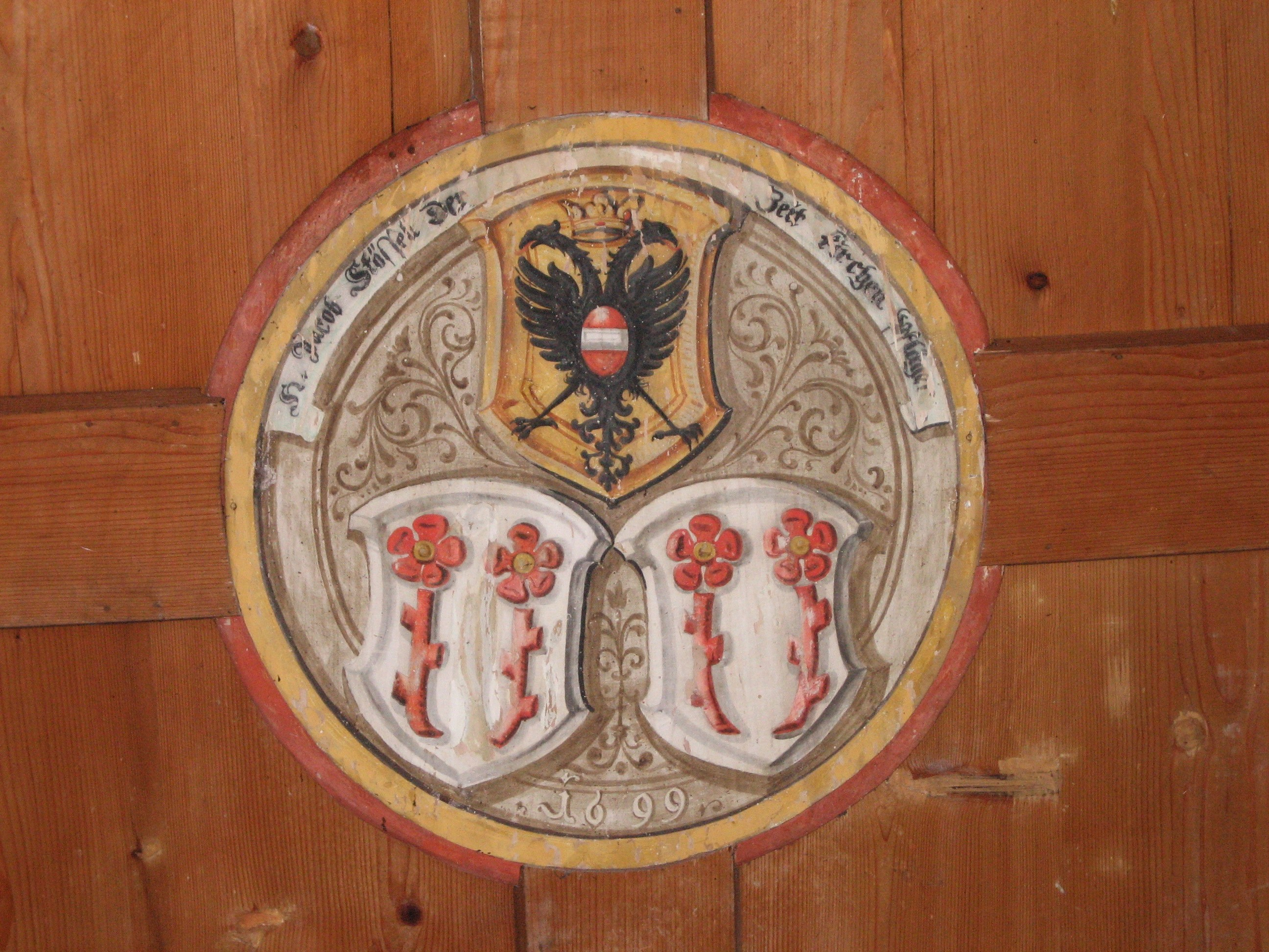 St.Dionys: Reichswappenschild der Stadt Rapperswil von 1699